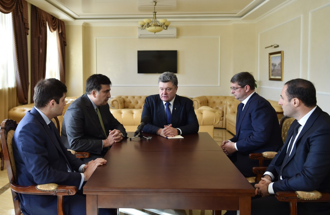 Нарада за участю заступника Генерального прокурора Давида Сакварелідзе, голови Одеської обласної державної адміністрації Міхеїла Саакашвілі, президента України Петра Порошенко, заступника глави АПУ Віталія Ковальчука та керівника управління Міністерства внутрішніх справ в Одеській області Георгі Лордкіпанідзе